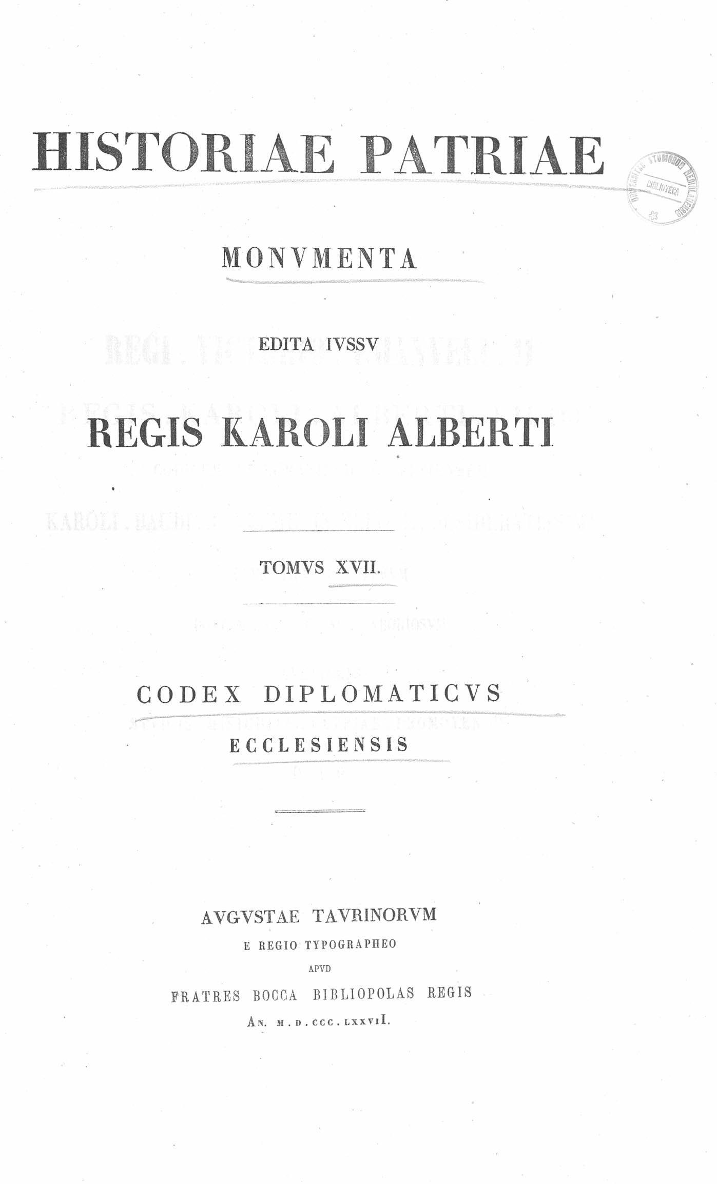 Frontespizio